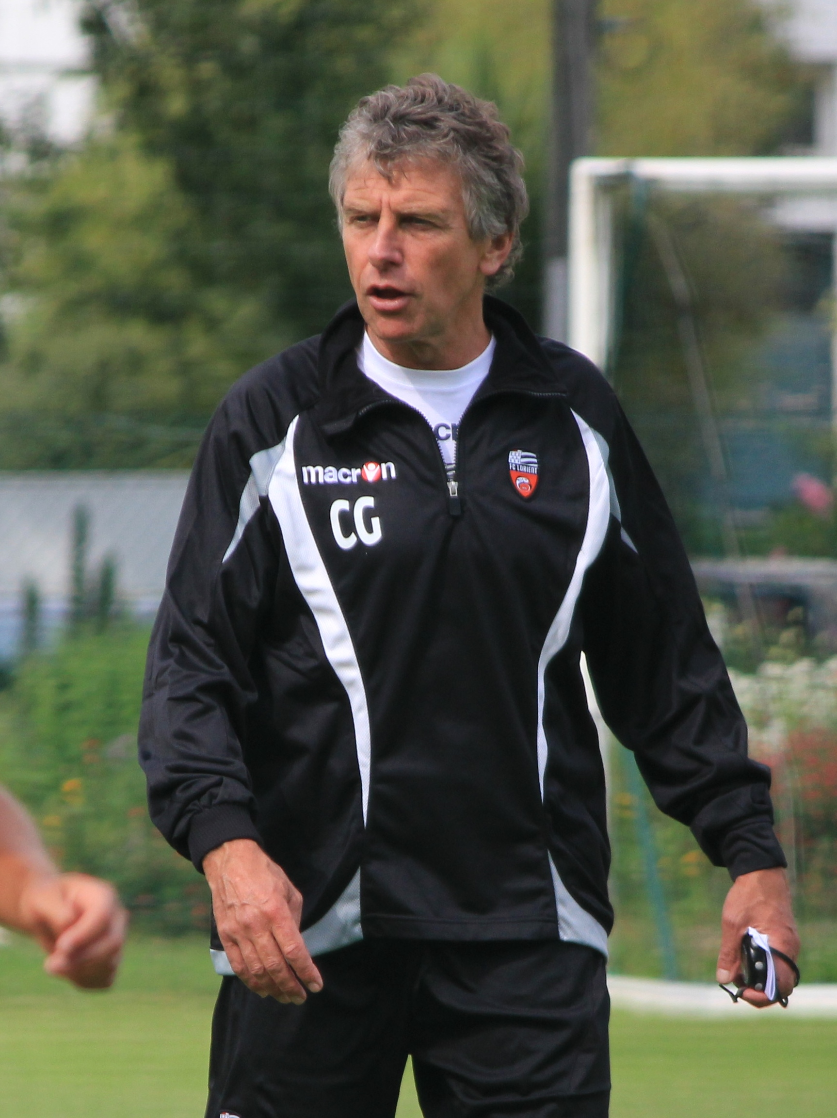 Christian Gourcuff lors de la reprise de l'entrainement du FC Lorient le 27 juin 2013